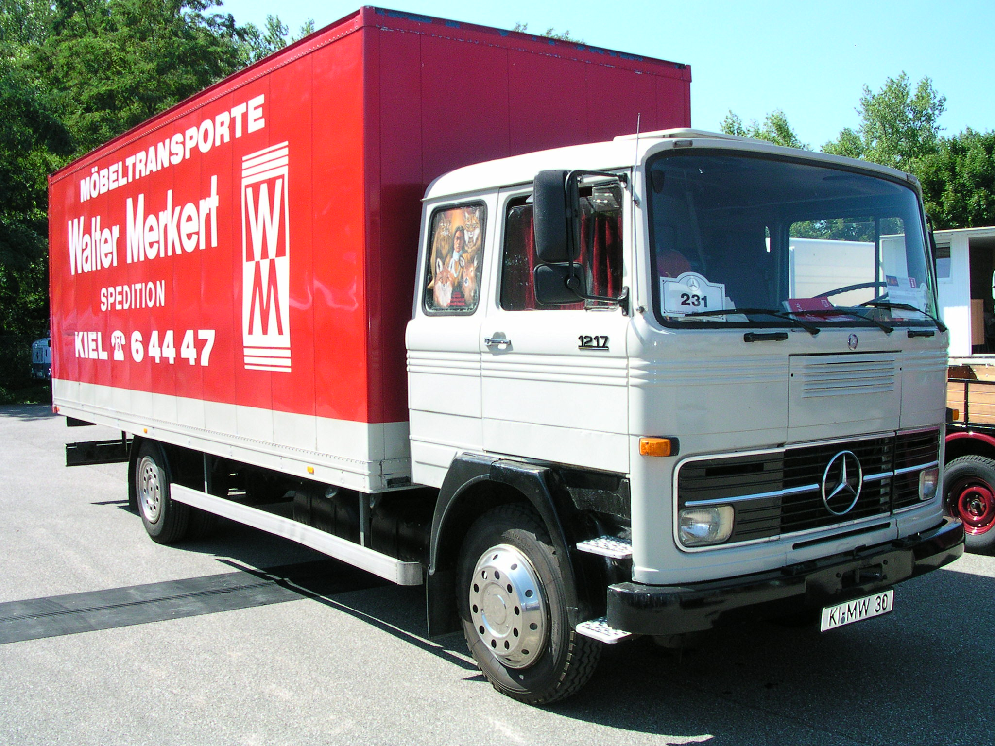 Mercedes LP 1217 oder laut Infoblatt an der Frontscheibe 1113, Baujahr 1975, 123 kW (168 PS) in Wörth am Rhein beim Oldtimer-Treffen bei Daimler-Chrysler